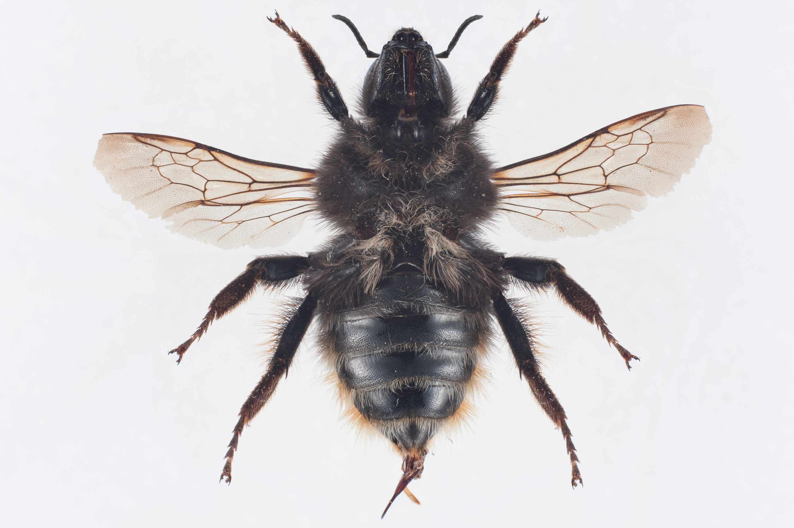 Dronning av enghumle Bombus sylvarum, underside.